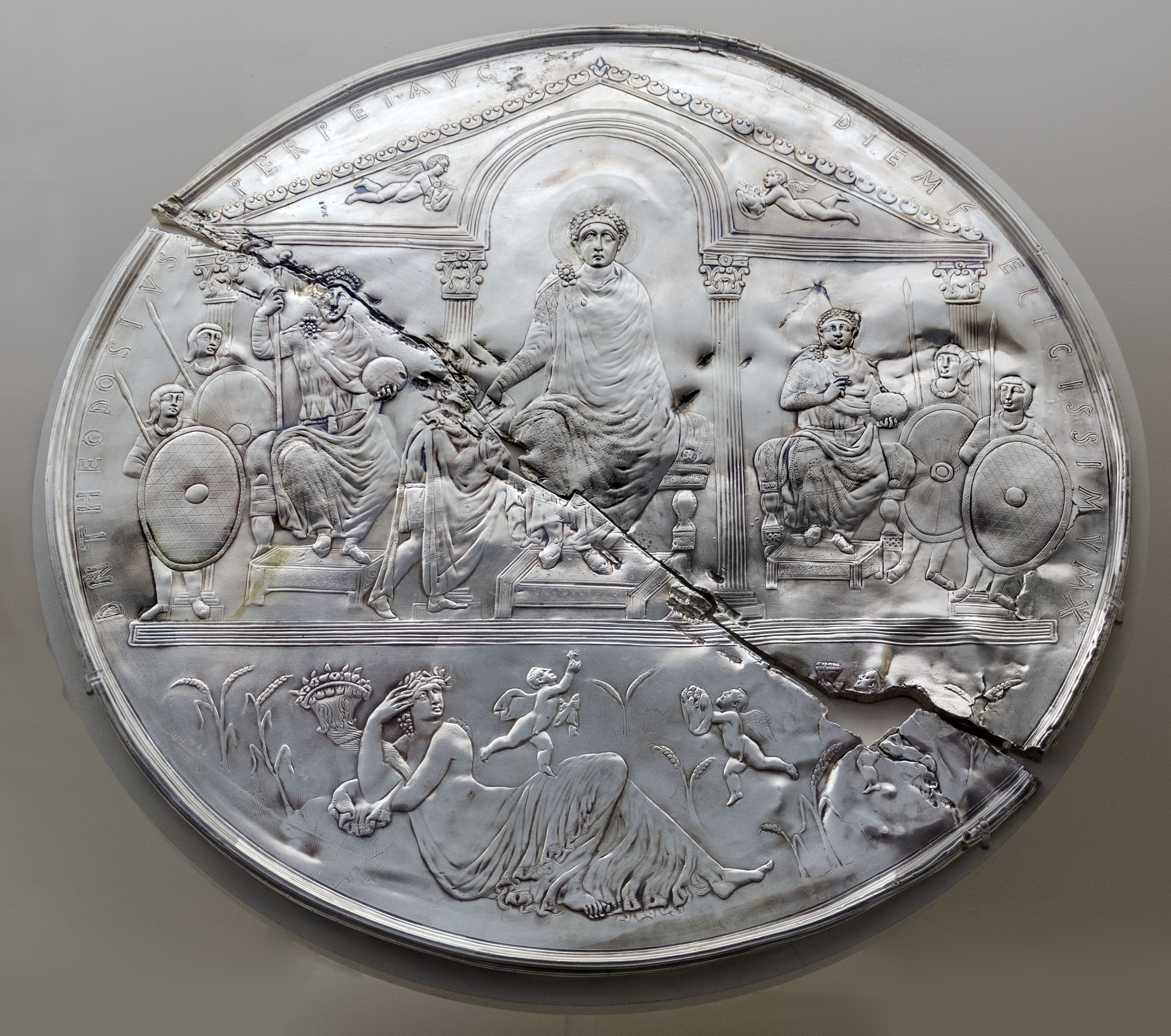 Disco conmemorativo del emperador Teodosio I, elaborado en plata y encontrado en 1847 en Almendralejo (Badajoz, España). Esta foto es de una réplica expuesta en el Museo Nacional de Arte Romano de Mérida (España). El original está depositado en la Real Academia de la Historia y no es accesible.